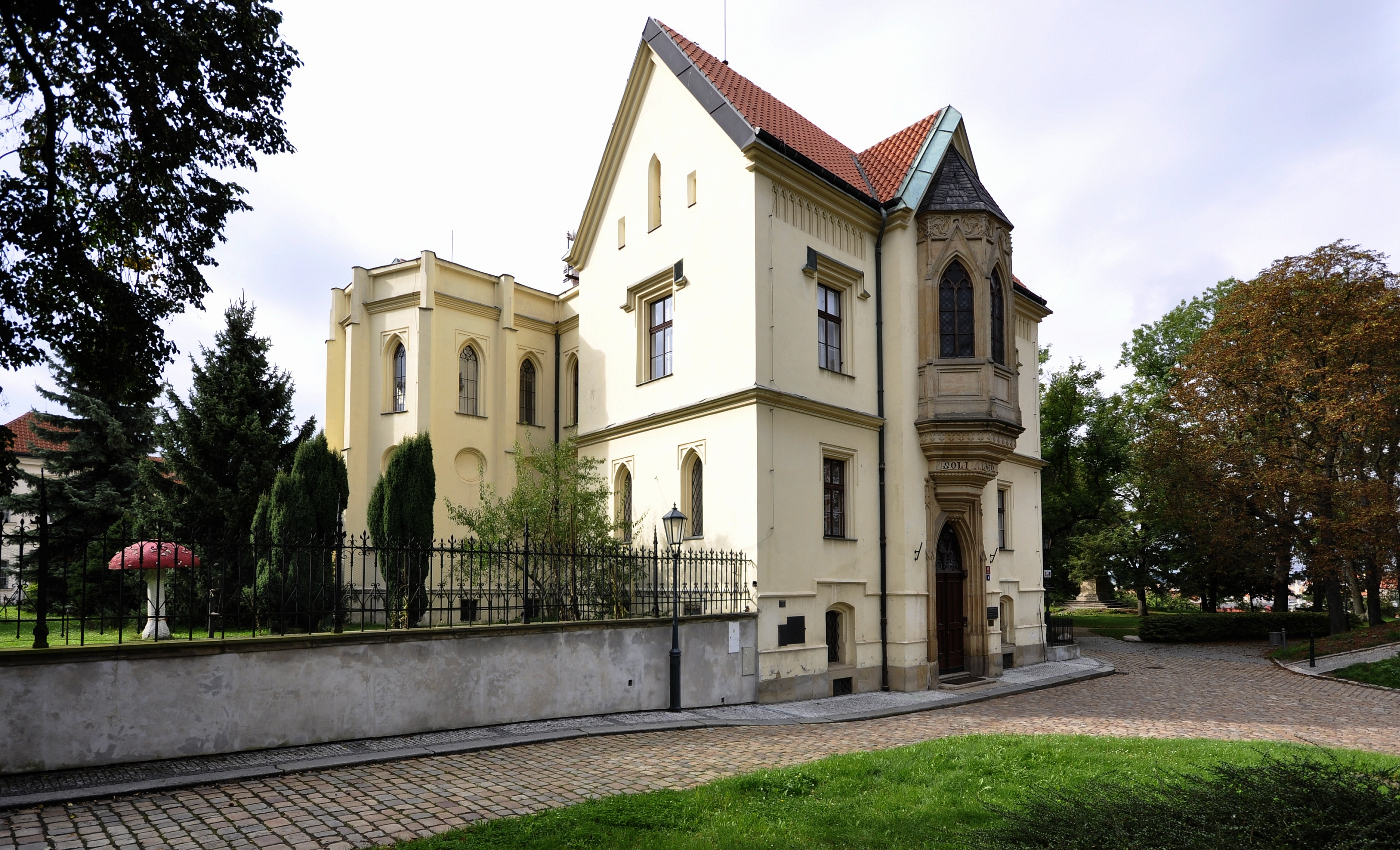 Nové proboštství, Štulcova 89/1 Vyšehrad.